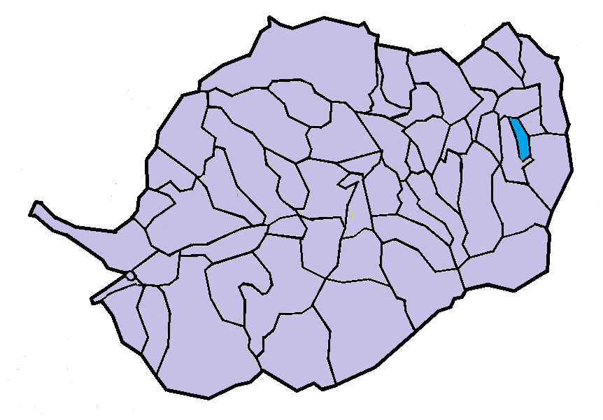 Jóc en el Conflent, a partir del mapa municipal del Conflent de lliure disposició adaptat al Nomenclàtor toponímic aprovat el 2007